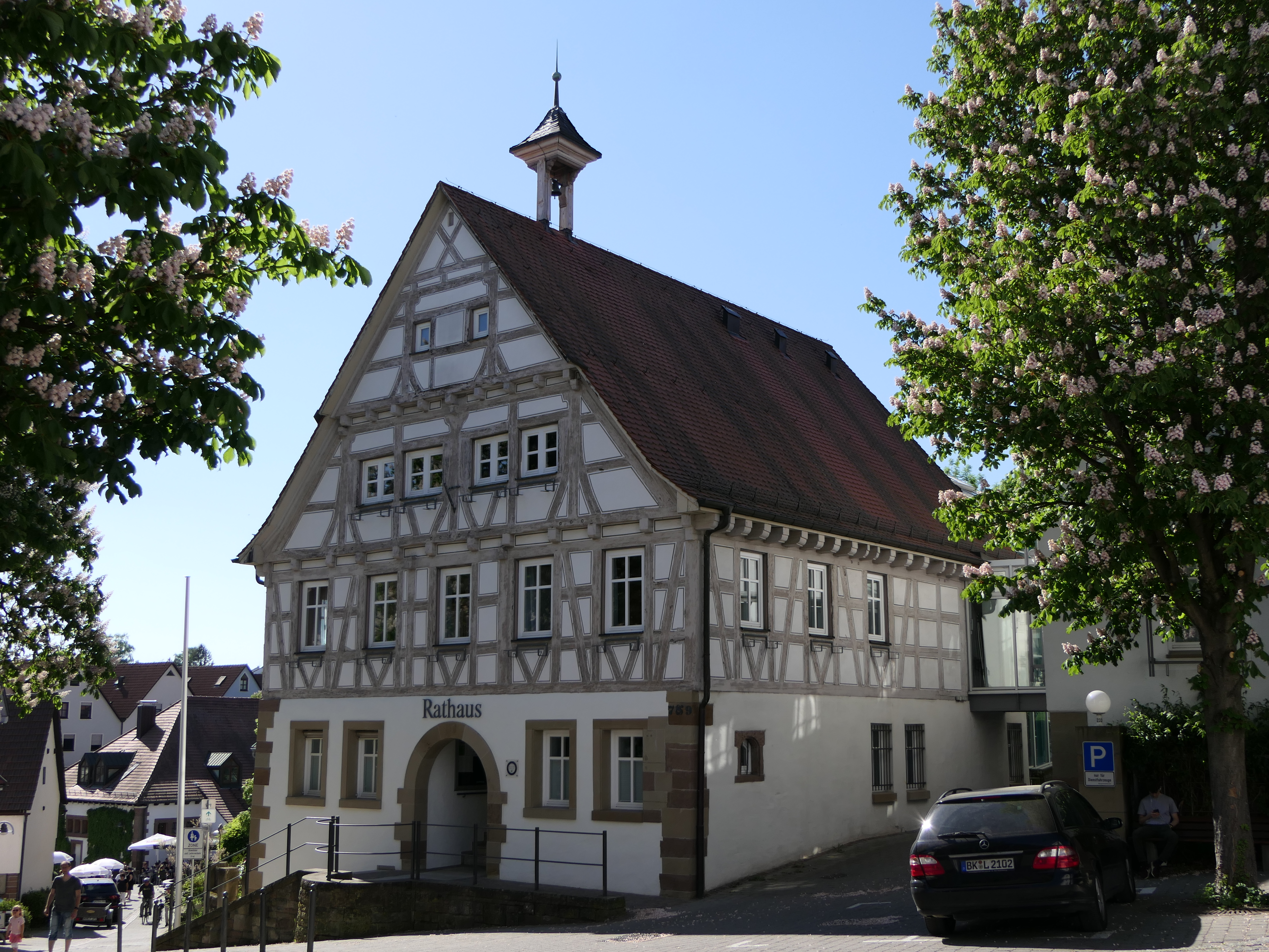 Das Rathaus in Korb, Rems-Murr-Kreis.